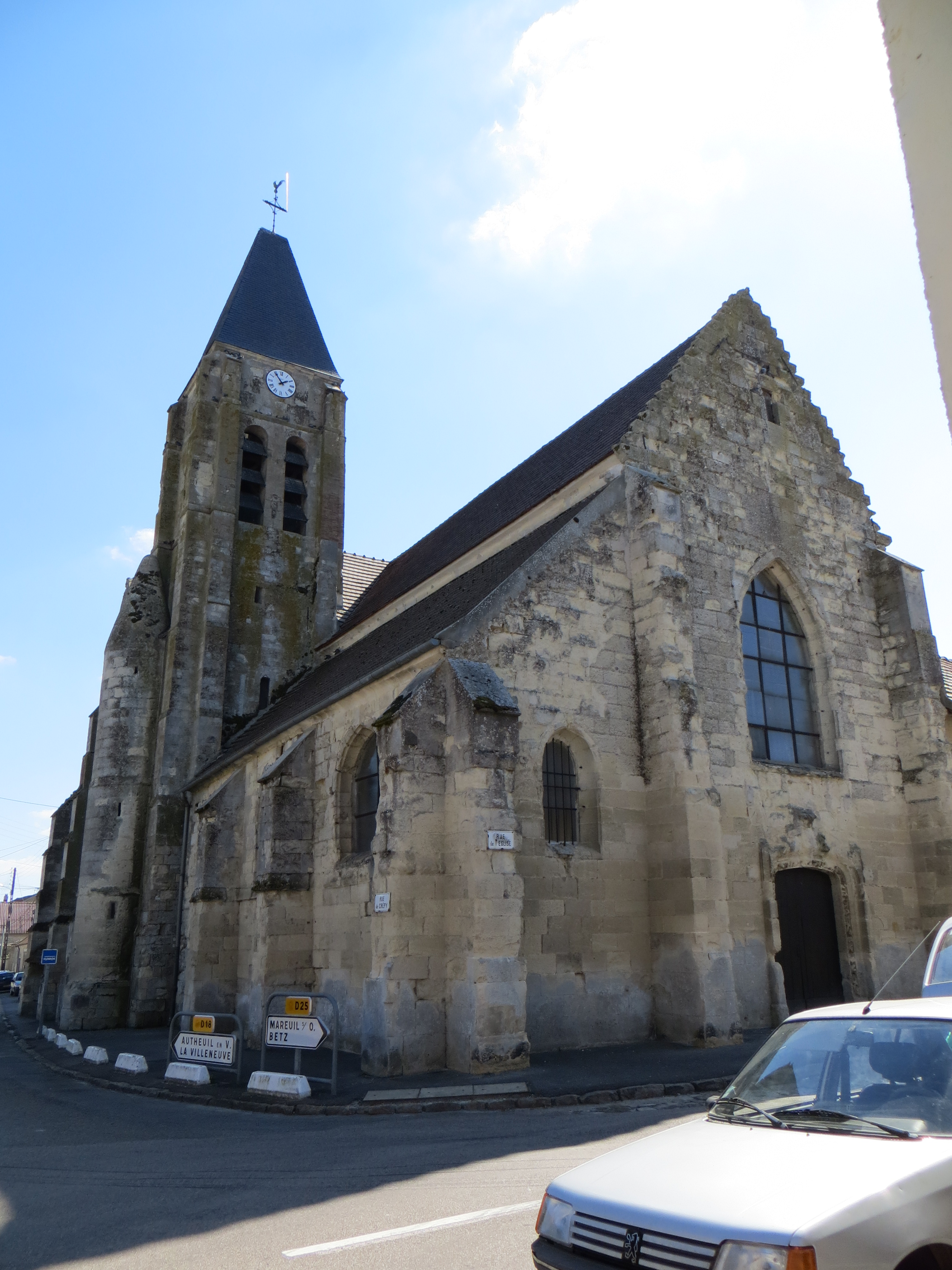 Vue générale de l'église